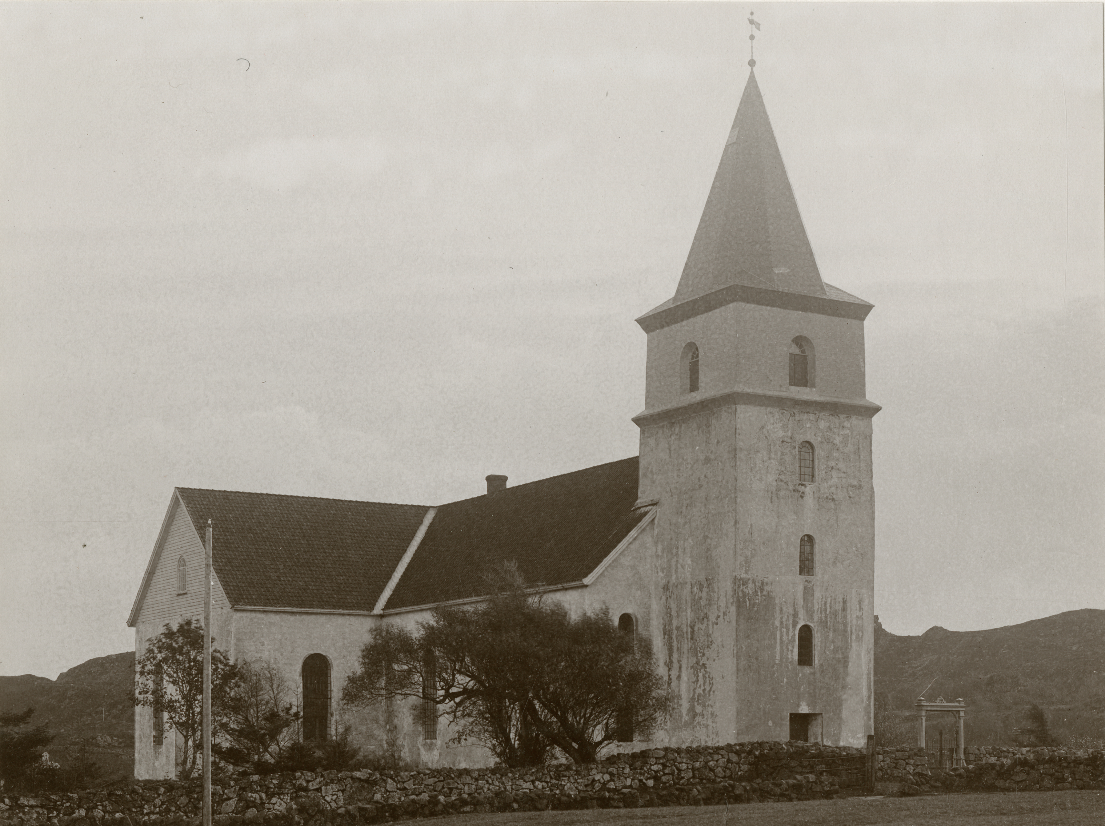 Vanse kirke i Farsund, Vest-Agder This image on crowdsourcing geotagging platform Fotodugnad